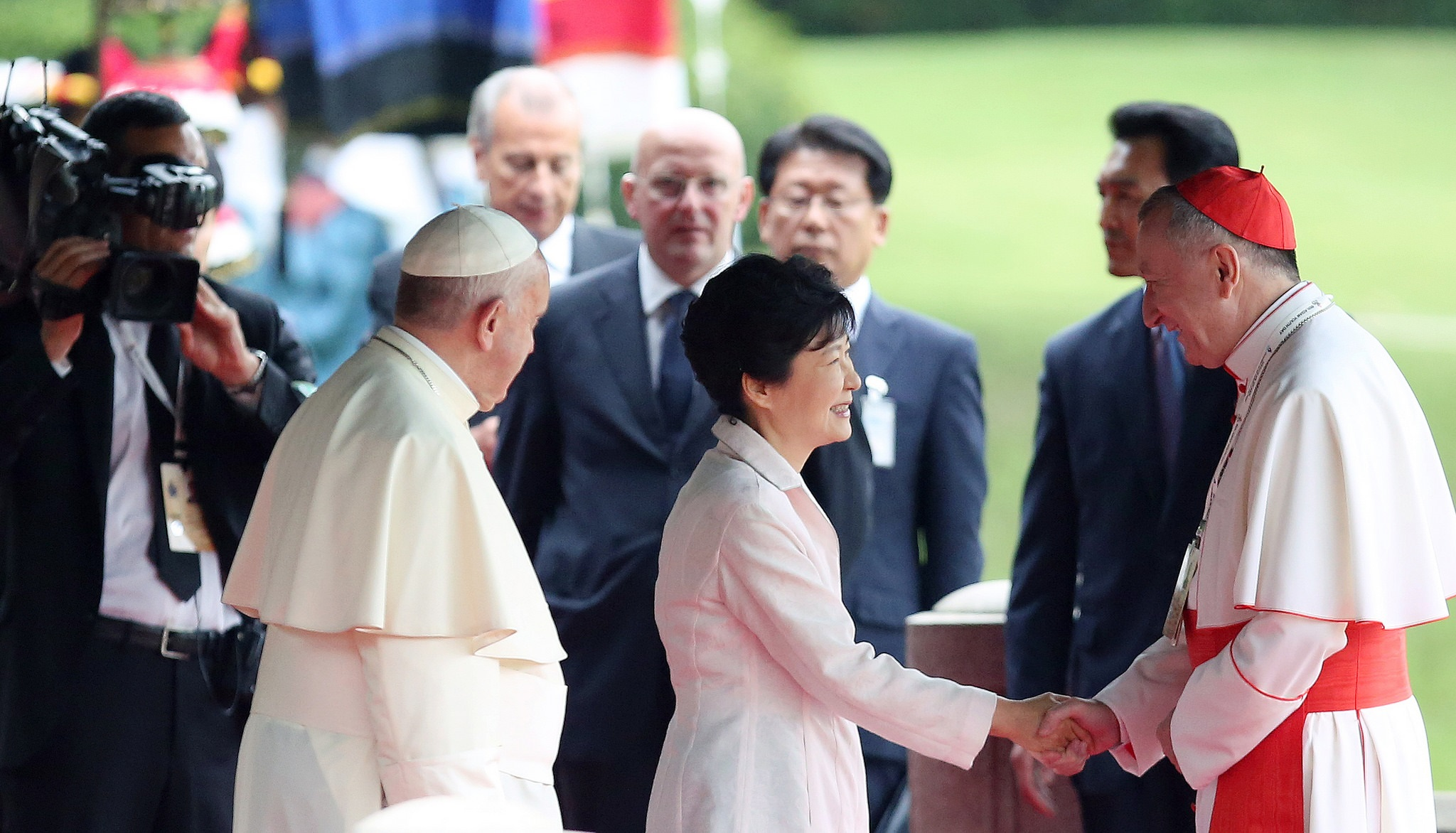 La président de Corée Park Geun-hye avec le Pape François, saluant le cardinal secrétaire d'état Pietro Parolin